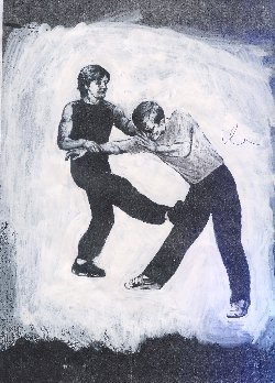 WingTzun